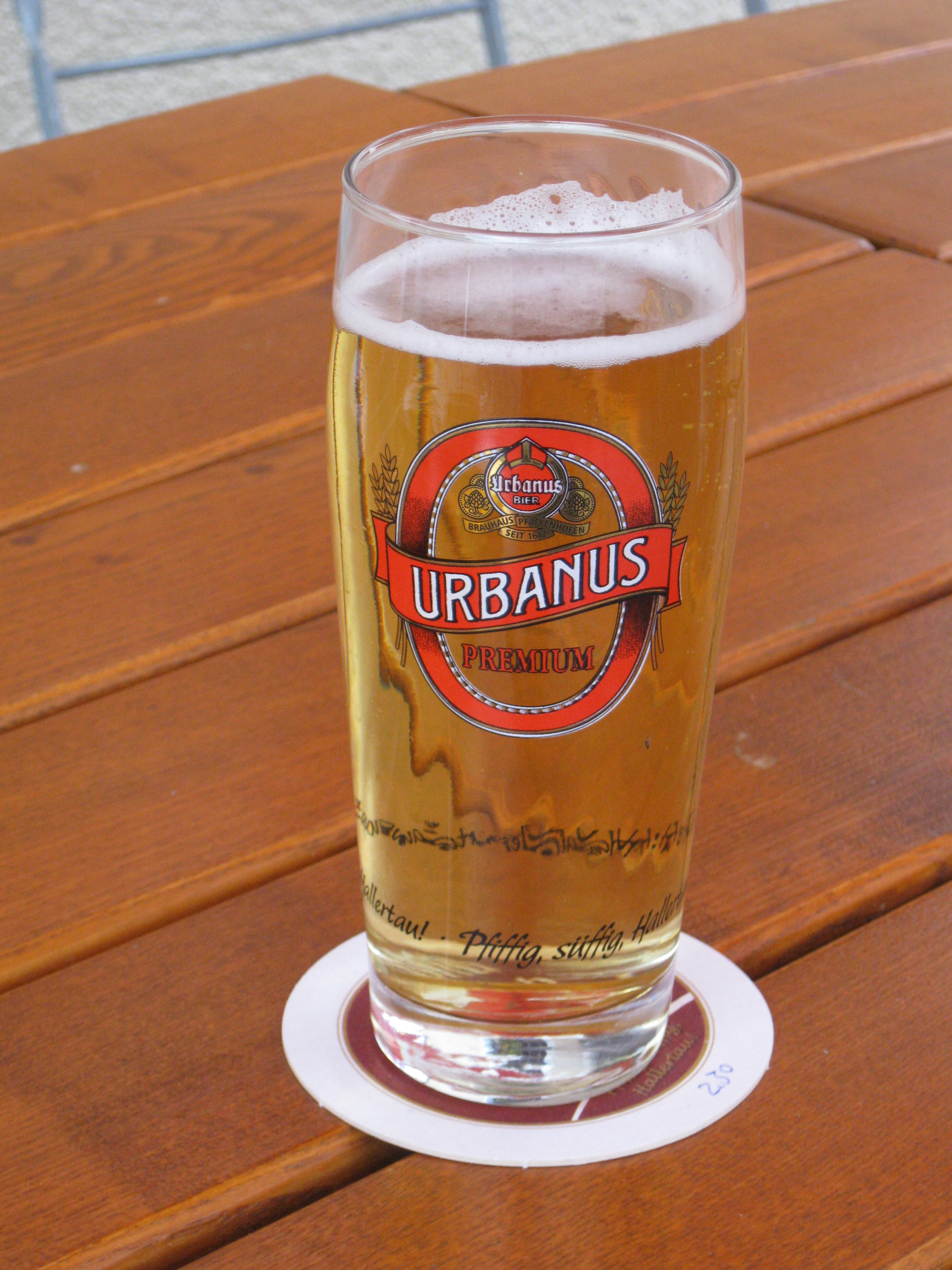 Urbanus Beer